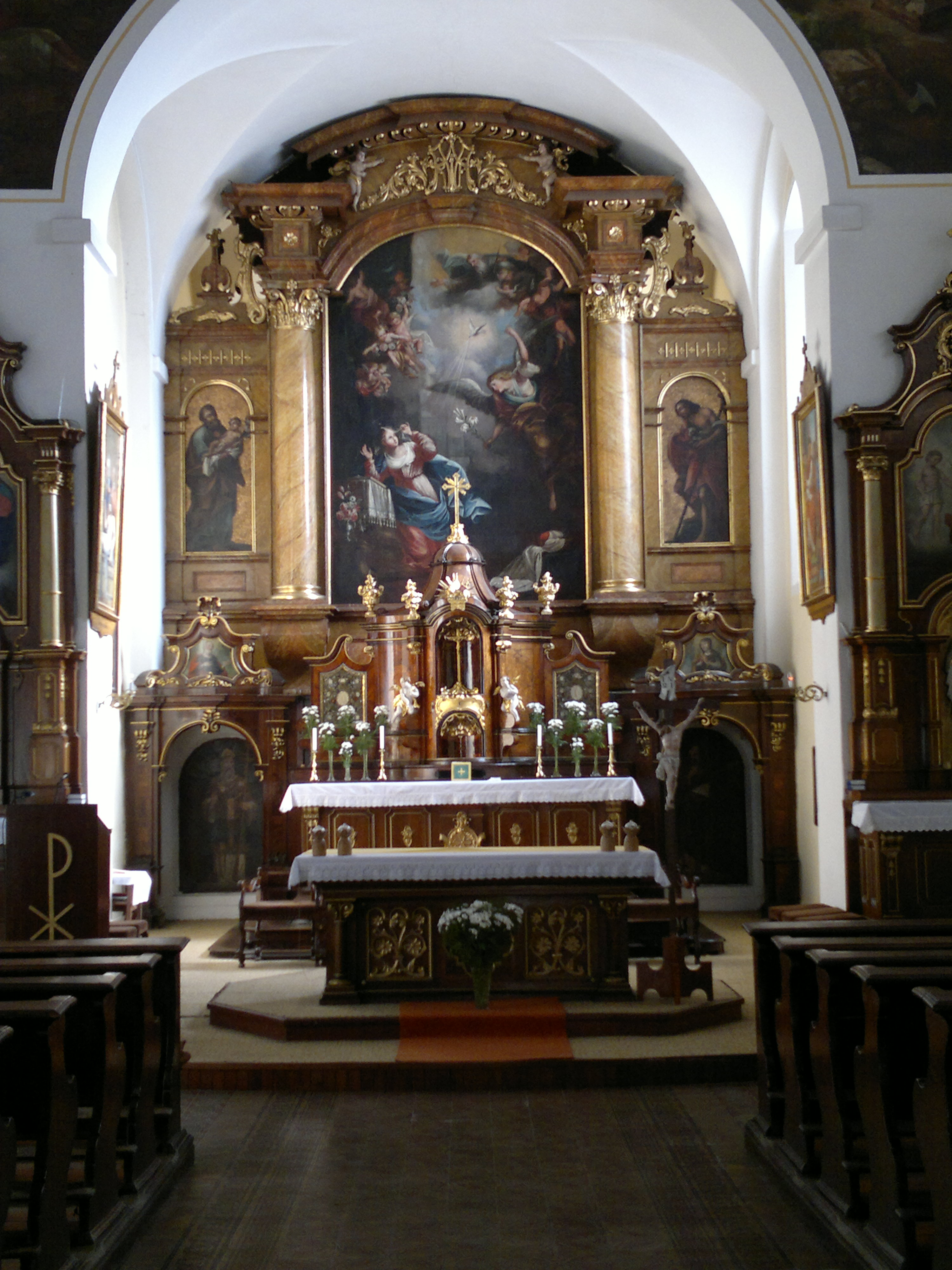 Kostel Zvěstování Panny Marie v Olomouci, hlavní oltář